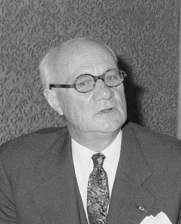 Persconferentie Emile Roche in gebouw Voorl. Europese Gemeenschappen te Den Haag